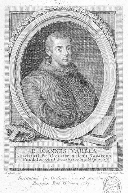 Gravat, dibuixat per Manuel Salvador Carmona, gravat per José Maea, s. XVIII, amb el retrat del venerable Juan Alfonso Varela, fundador dels Frares Penitents de Jesús Natzarè